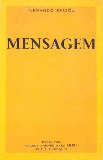 Fernando Pessoa "Mensagem", Lisboa, 1934, Parceria António Maria Pereira, 1934